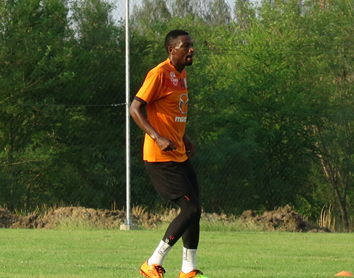 Noah Chivuta